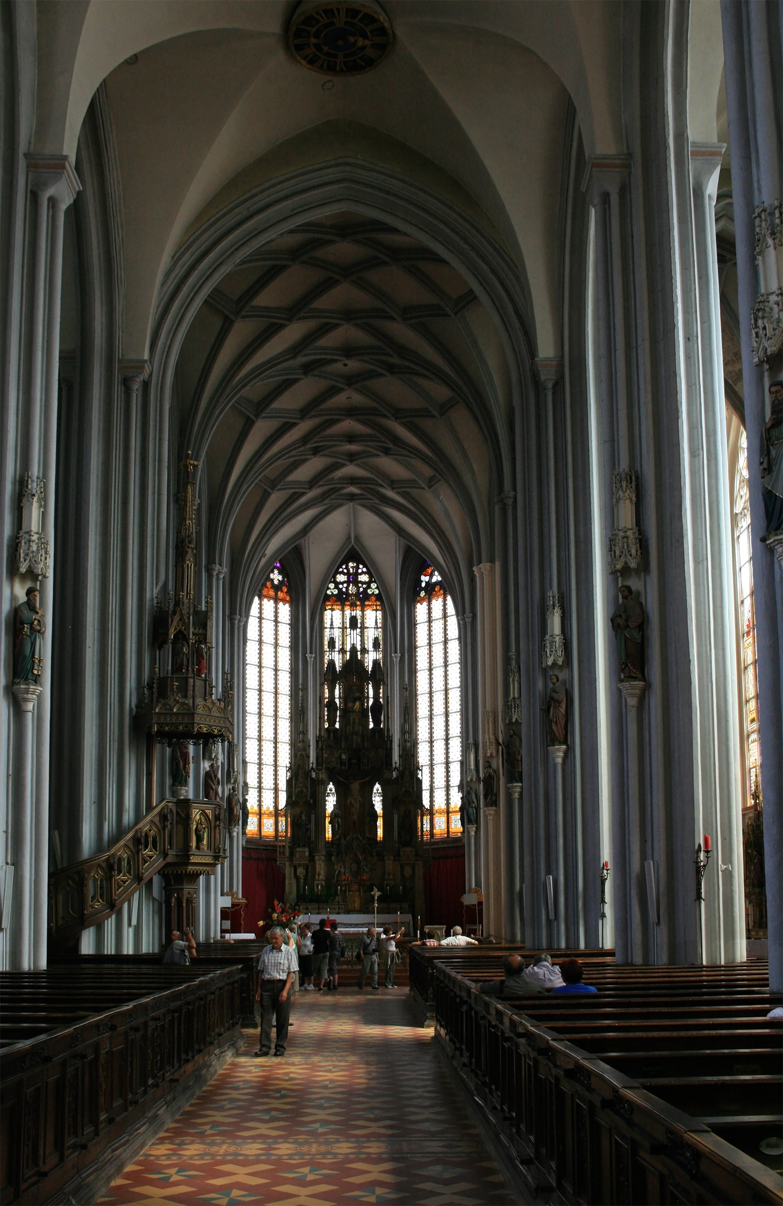 Das Mittelschiff der Steyrer Stadtpfarrkirche mit Blick zum neugotischen Hochaltar